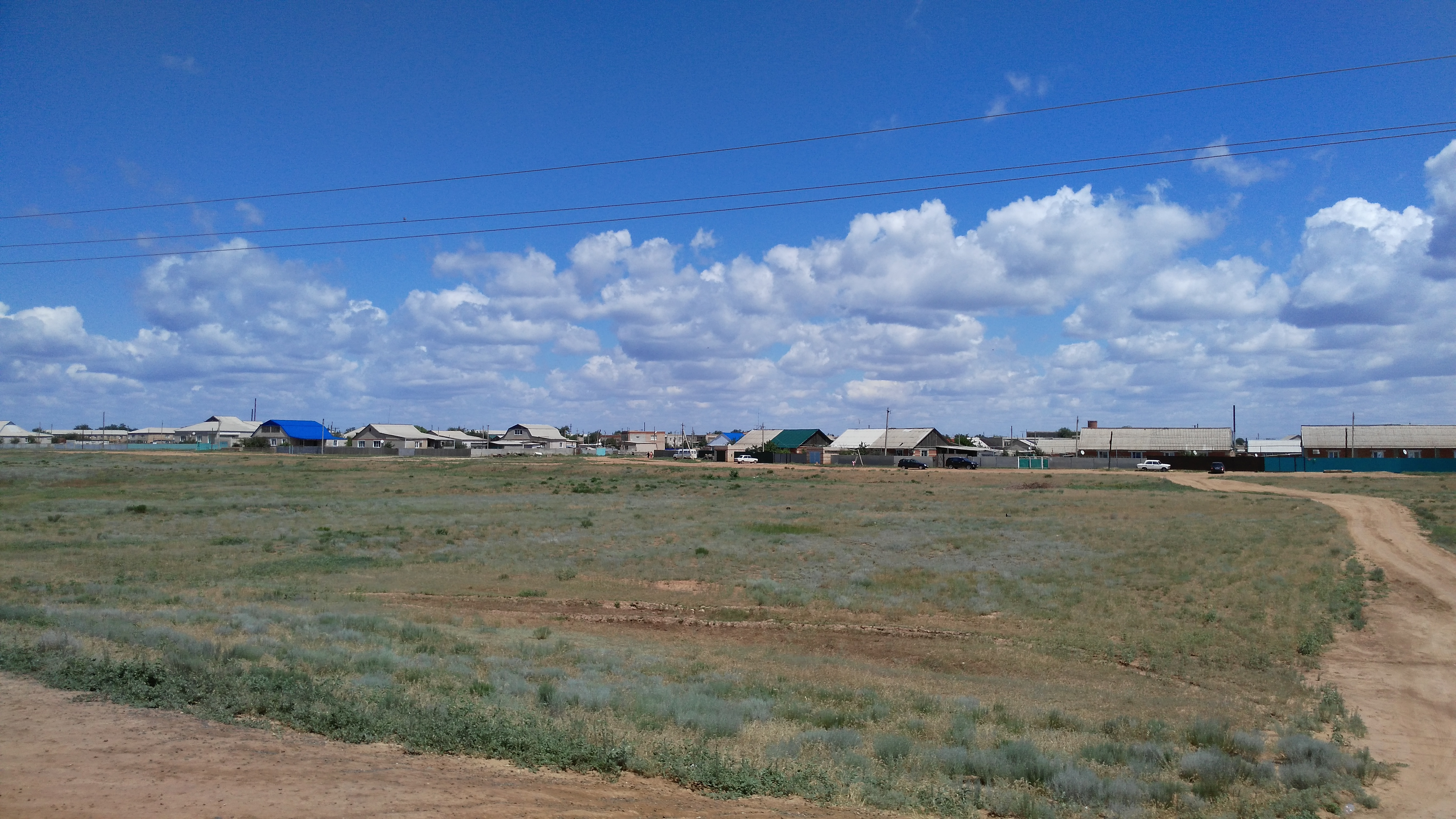 Вид на посёлок Цаган Аман со стороны трассы М-6, 2016 год